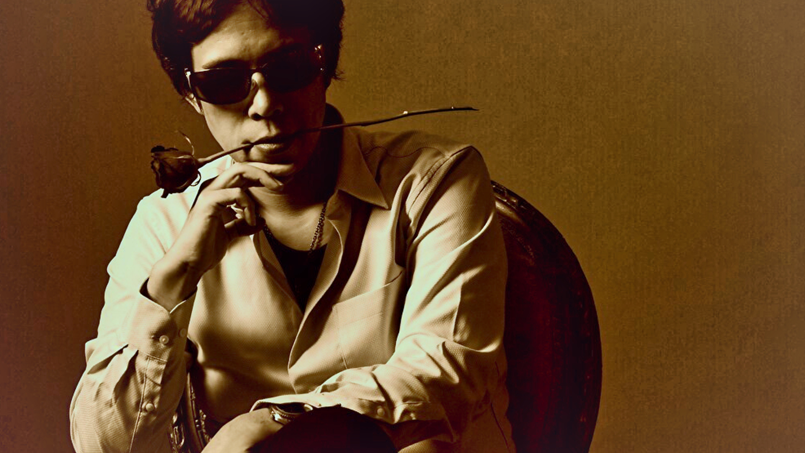 鼻毛の森のアーティスト写真です